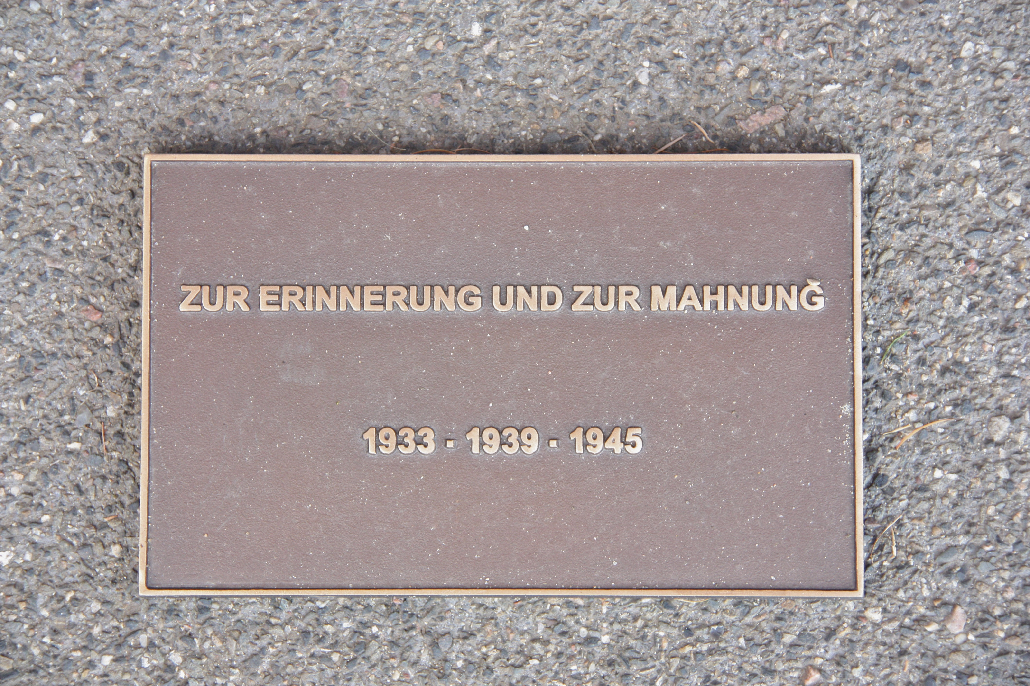 Hamburg, Wellingsbüttel, Lutherkirche, Text der "Mahntafel"